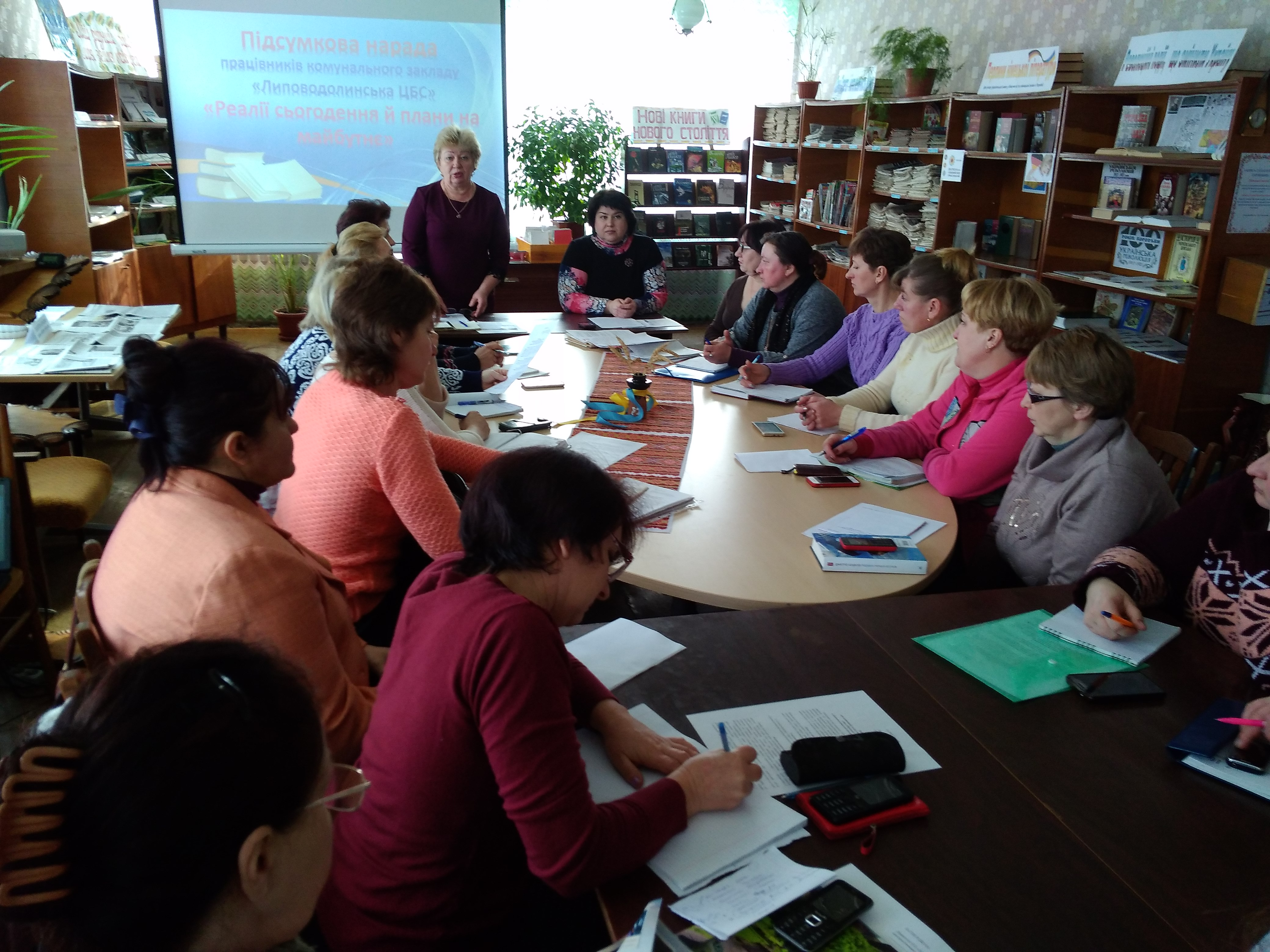 бібліотека